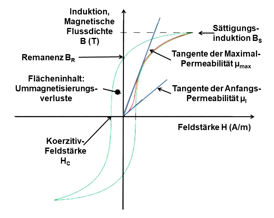 Hysteresekurve weichmagnetischer Werkstoffe, Definition zweier Permeabilitätswerte